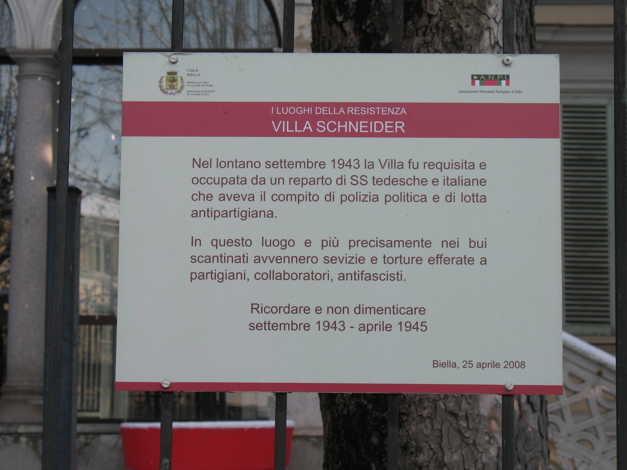 Targa commemorativa a Villa Schneider, Biella, Piemonte, Italia.